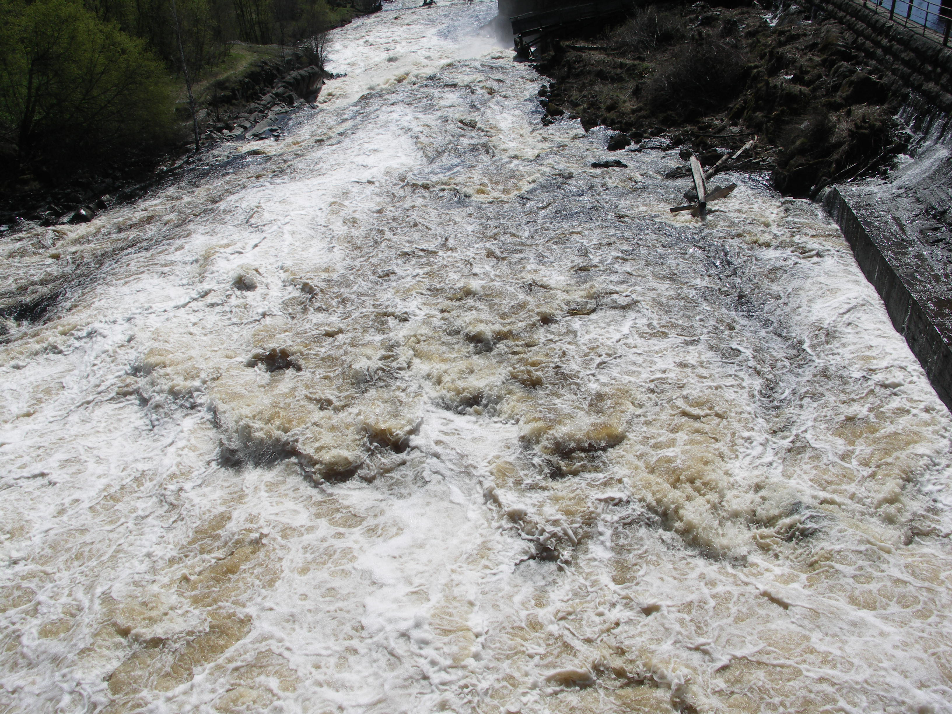 Янисйоки